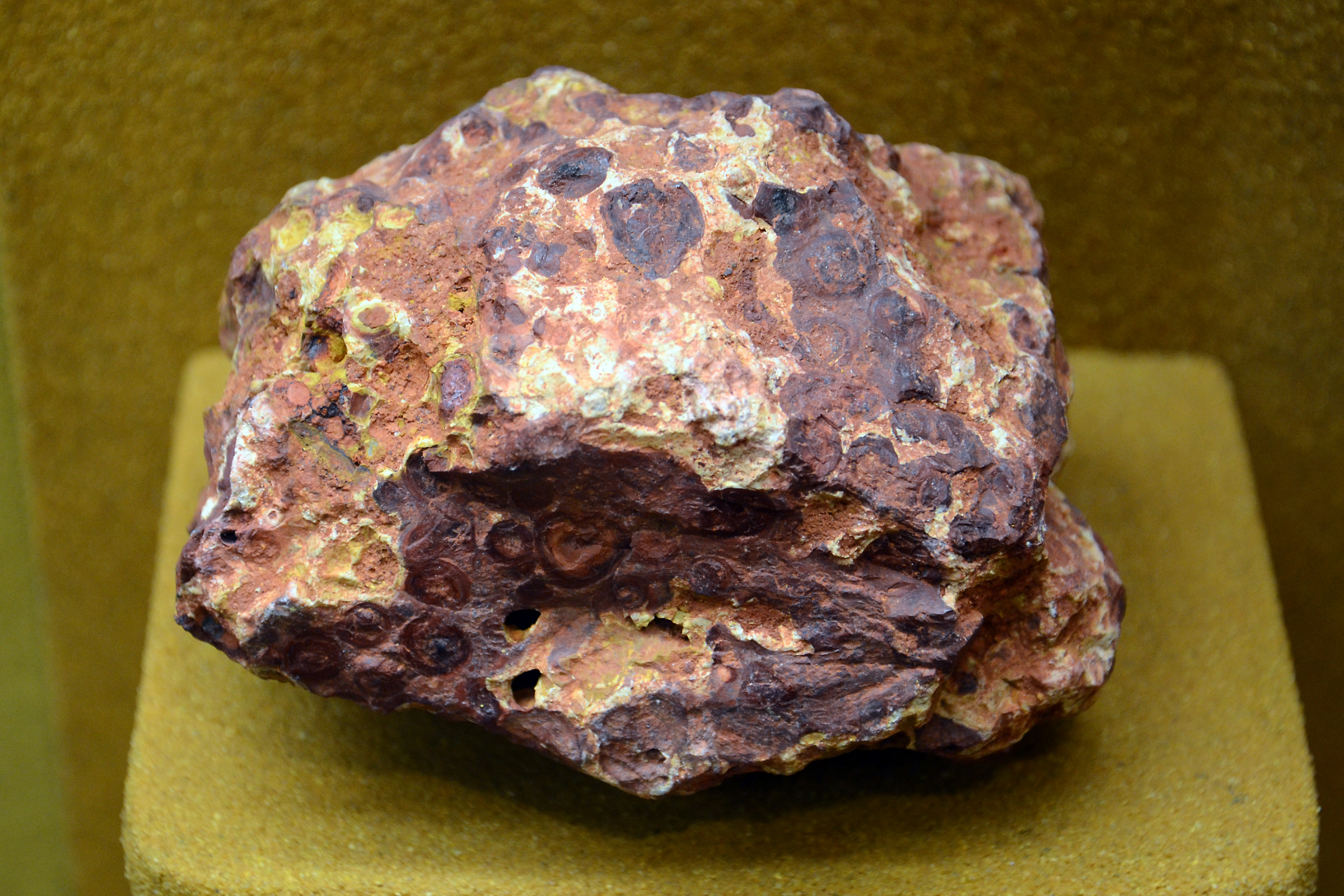 Bauxit, Pfalzmuseum für Naturkunde Bad Dürkheim